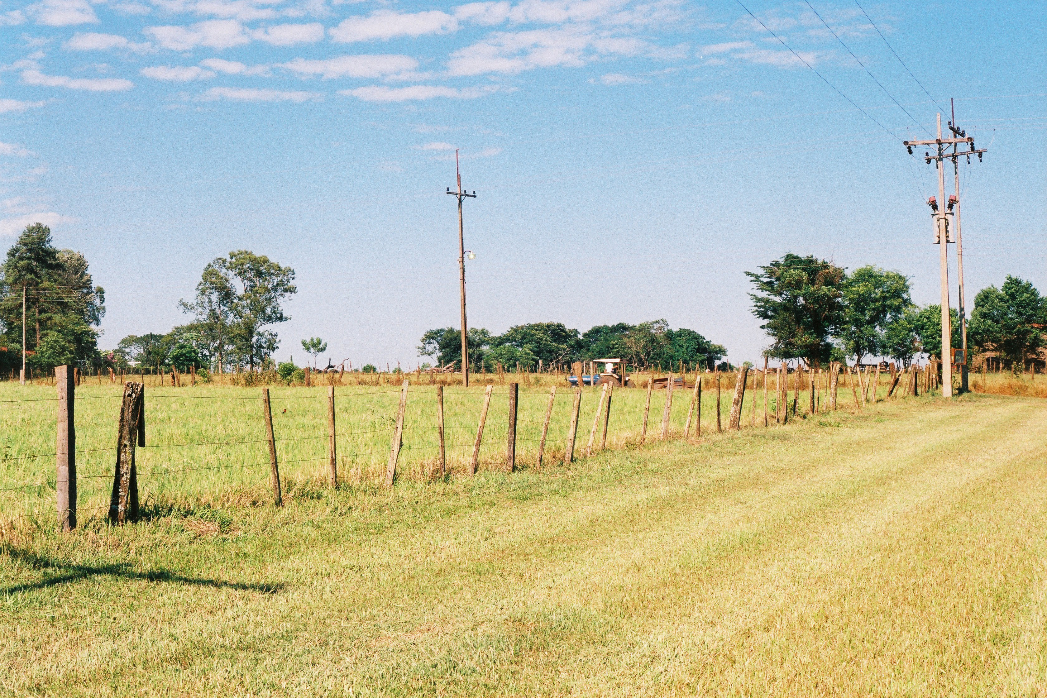 Laureles Paraguay